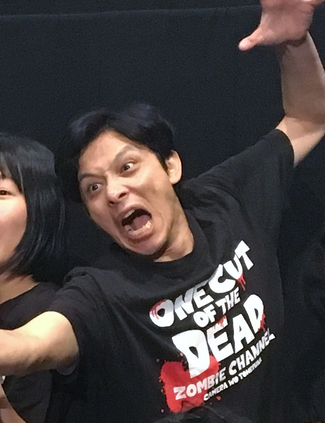 山口友和（2018年7月14日、チネチッタ川崎「カメラを止めるな!」舞台挨拶）